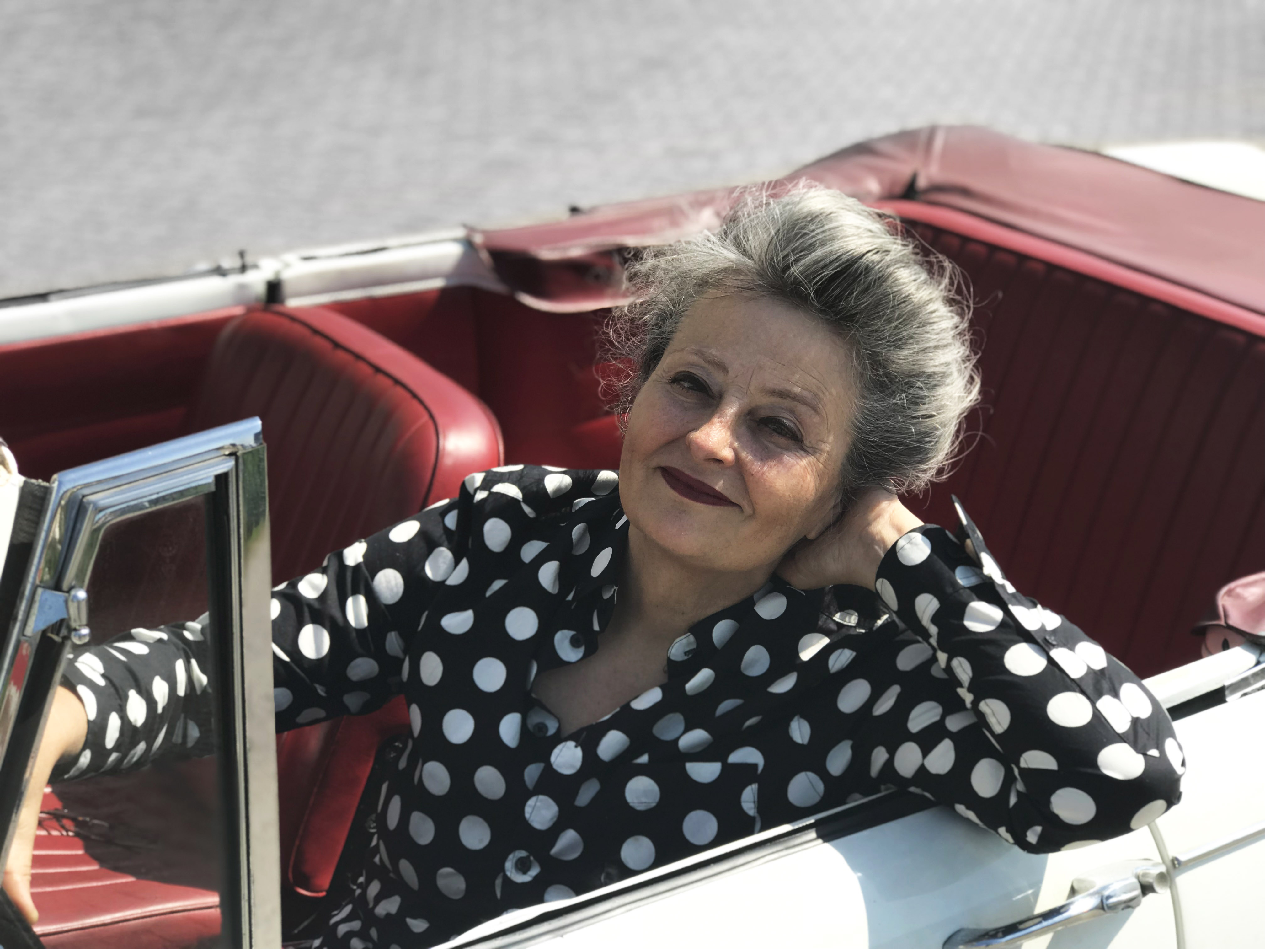 Maroeska Metz, auteur kookboek Hoe Dan?!